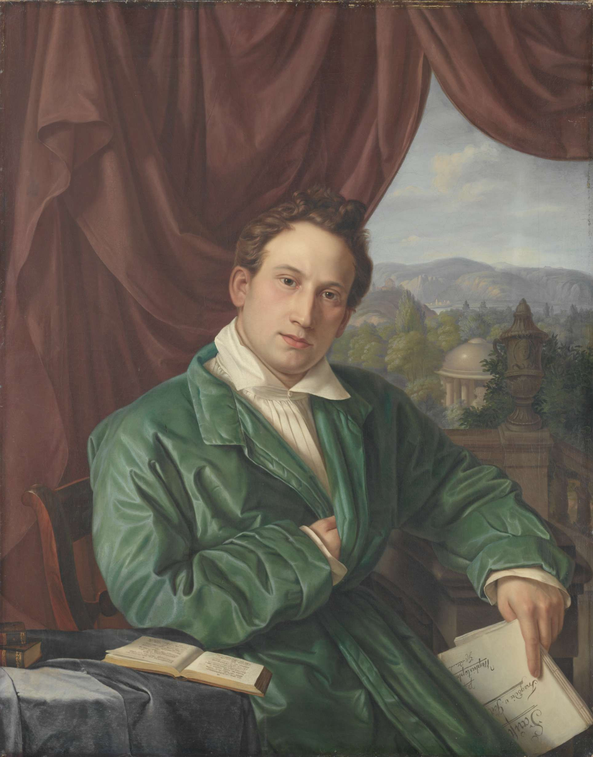 Karl August Ludwig Quanter (1805–1876), deutscher Schauspieler